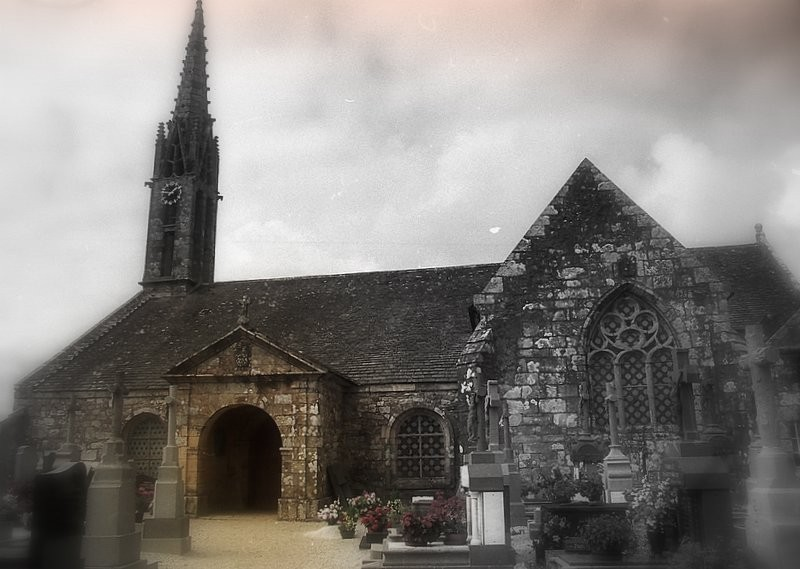 église Argol, le porche, denez goasguen.